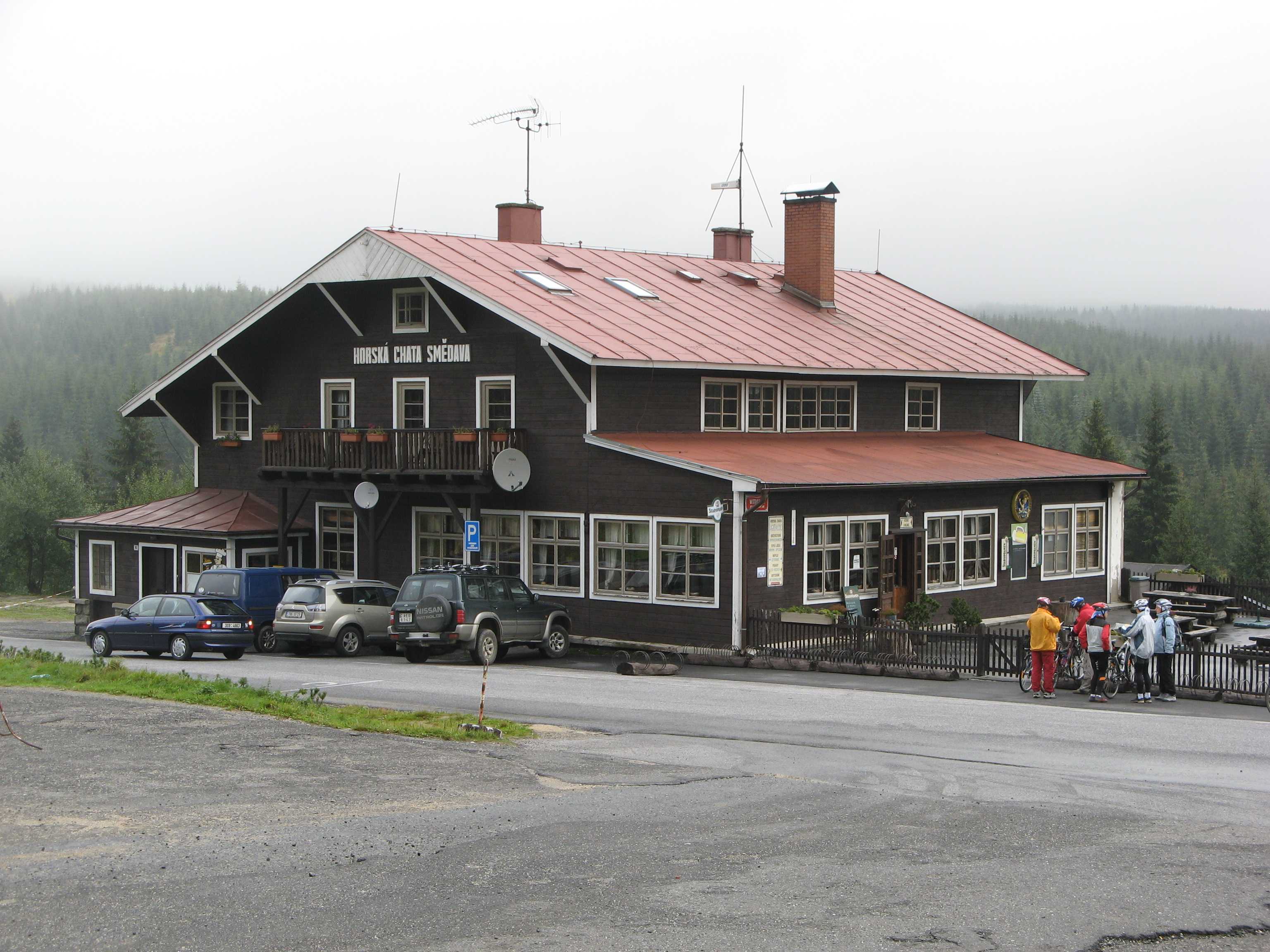 Smědava, Jizera Mountains, Czech Republic